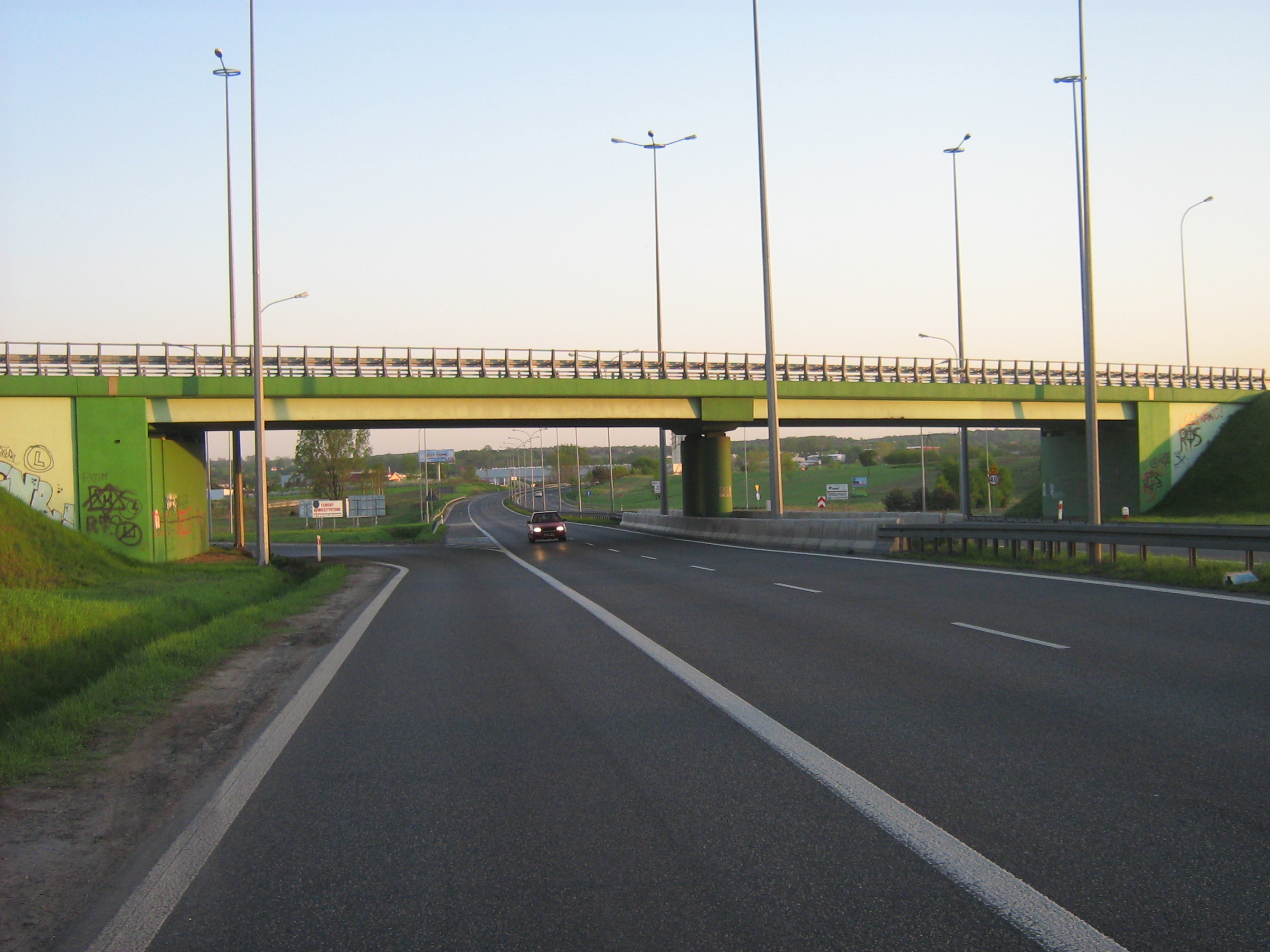 Droga krajowa nr 8 w Rawie Mazowieckiej.